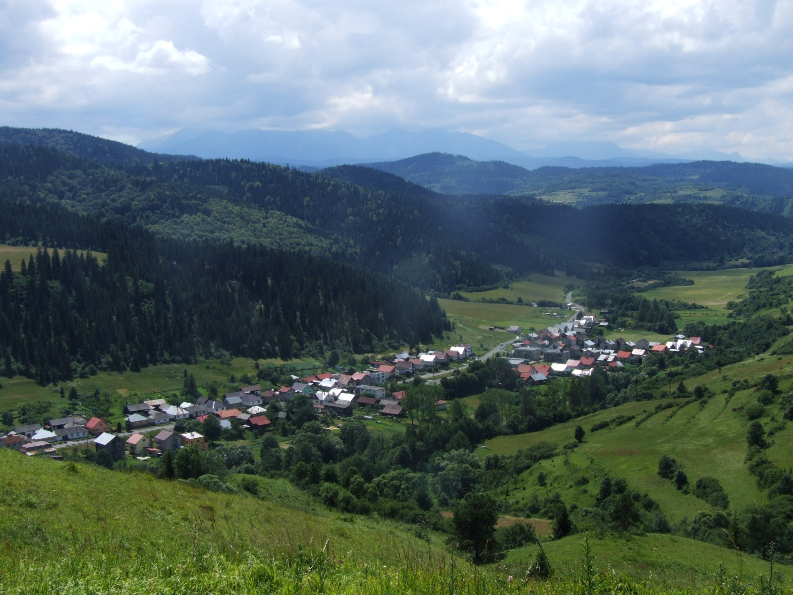 Wielki Lipnik na Słowacji. Widok z przełęczy pod Tokarnią